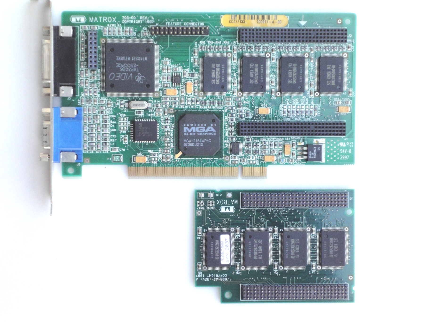 Matrox Millennium II